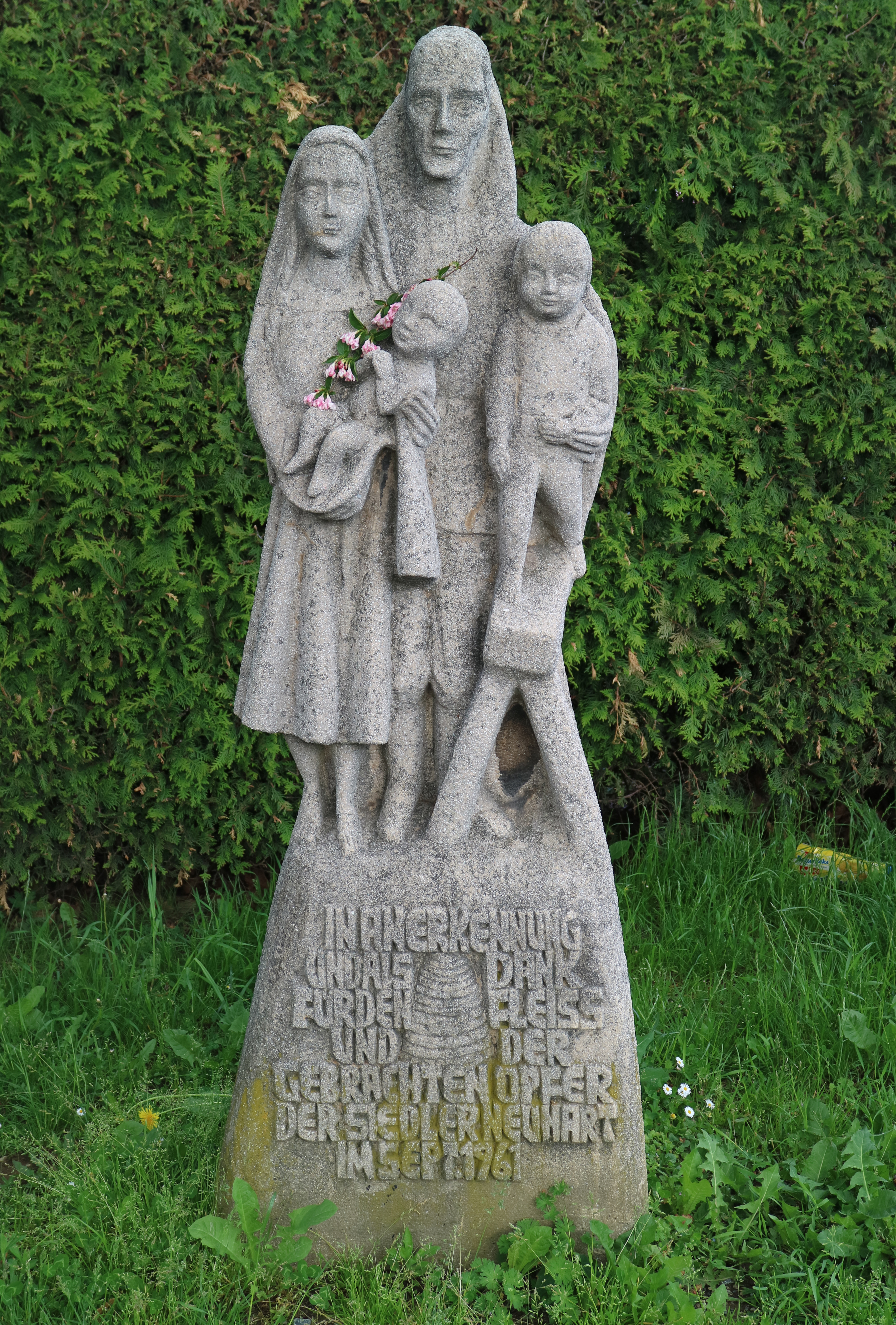 Siedler-Ehrenmal von Alfred Schlosser (1961) in Graz-Neuhart